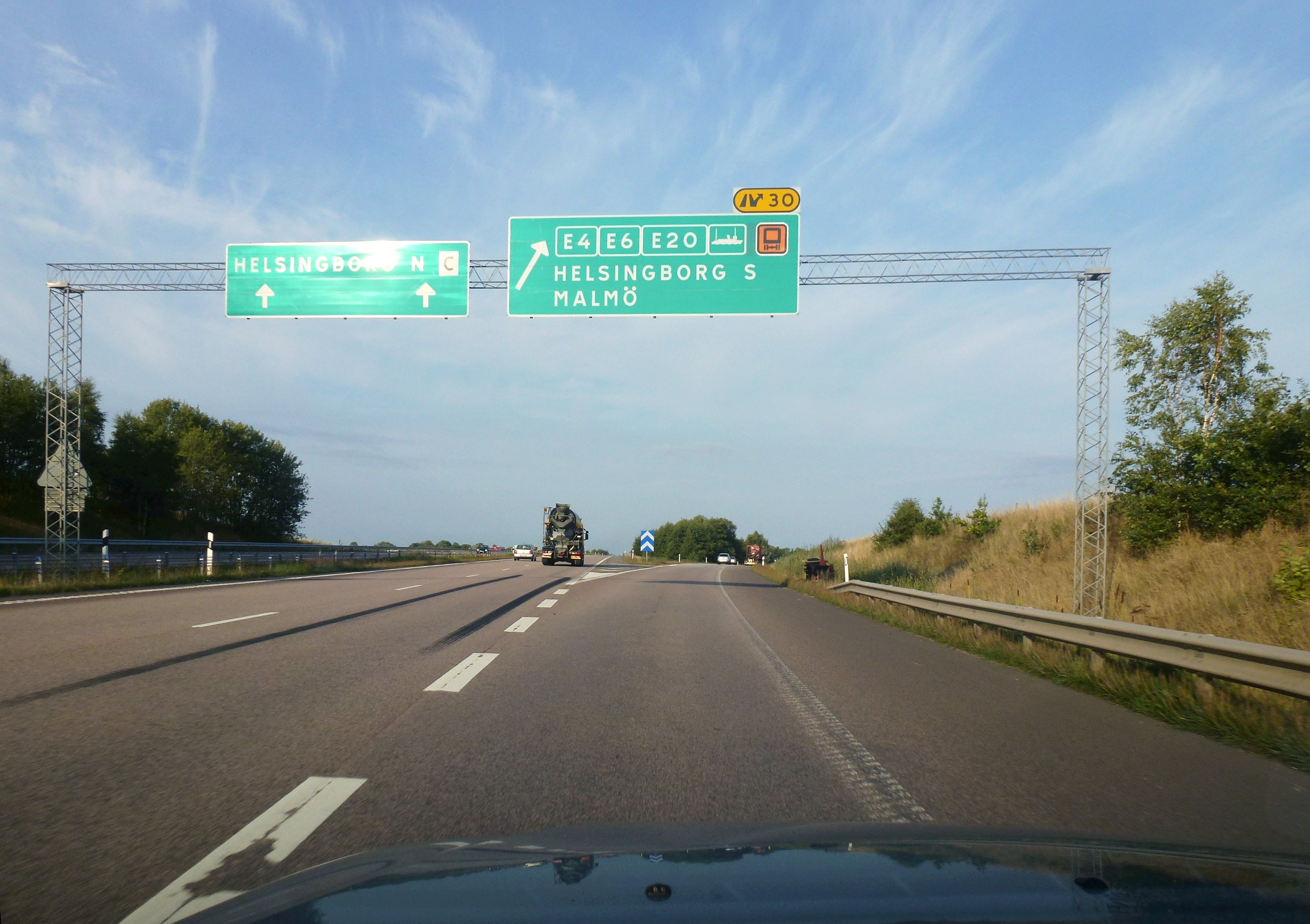 Trafikplats Kropp, söderut (strax före)